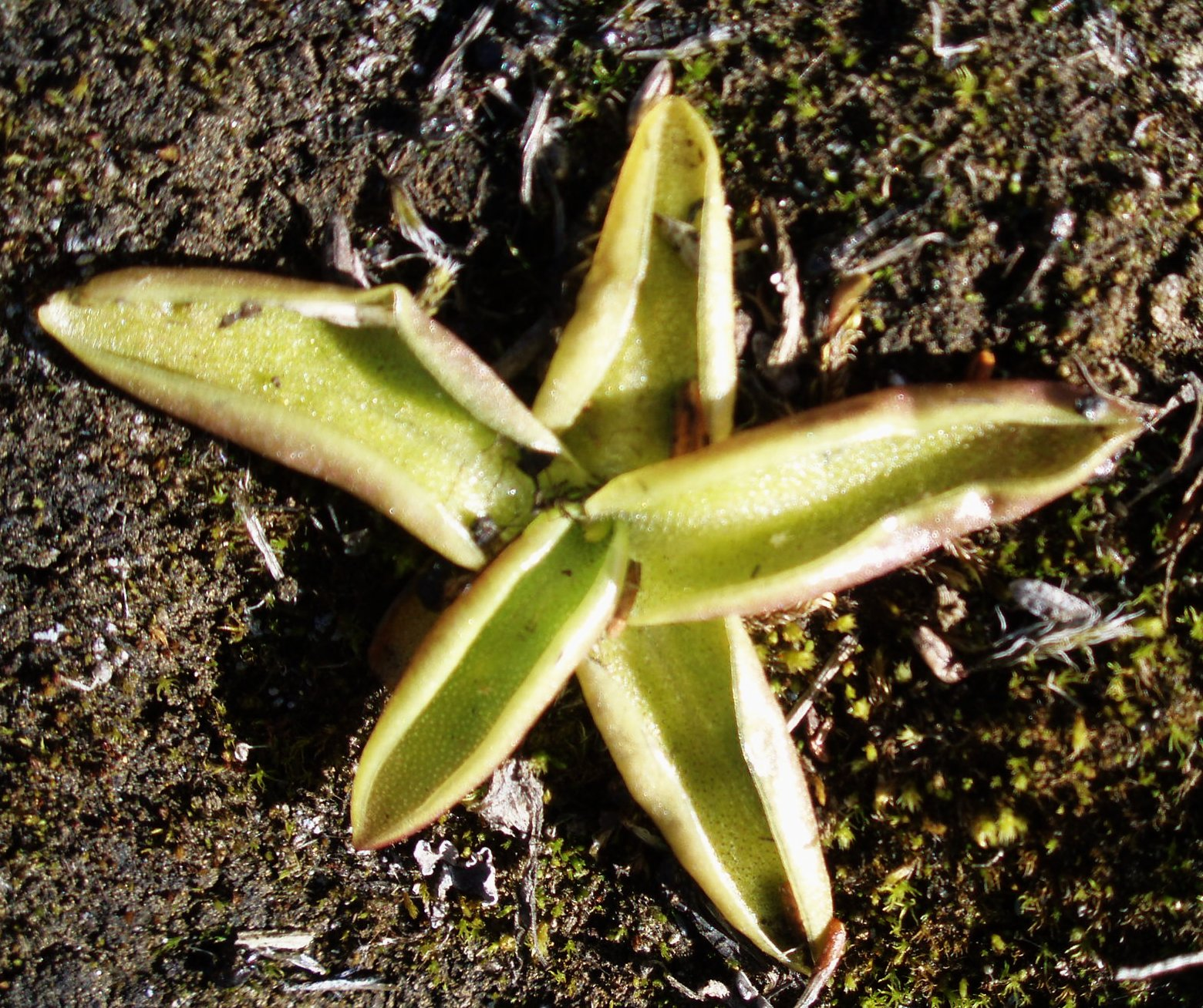 Pinguicula vulgaris (de: Gemeines Fettkraut) nearby Myvatn in Iceland